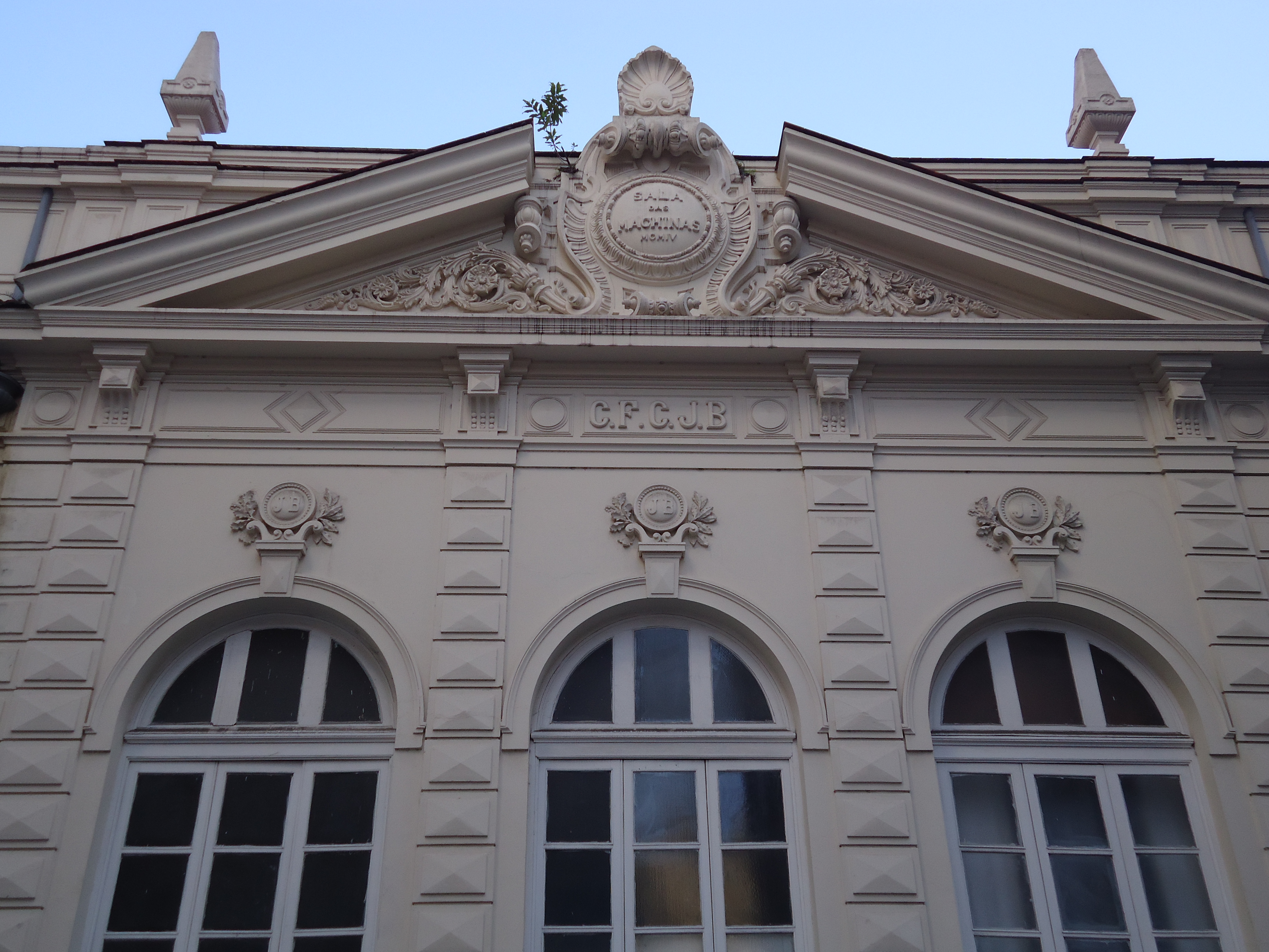 Prédio da Sala das Máquinas da Companhia Ferro-Carril do Jardim Botânico (1904), visto da Rua 2 de Dezembro, no bairro do Flamengo, cidade e município do Rio de Janeiro, estado do Rio de Janeiro, Brasil.